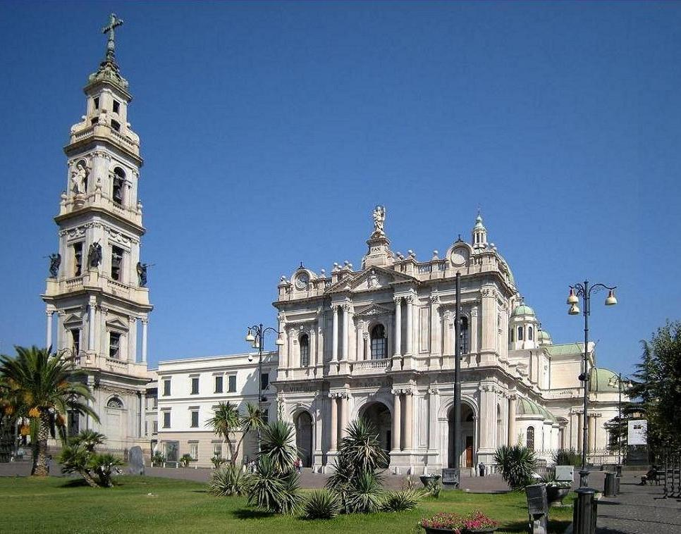 Basílica de Nossa Senhora do Rosário de Pompéia.